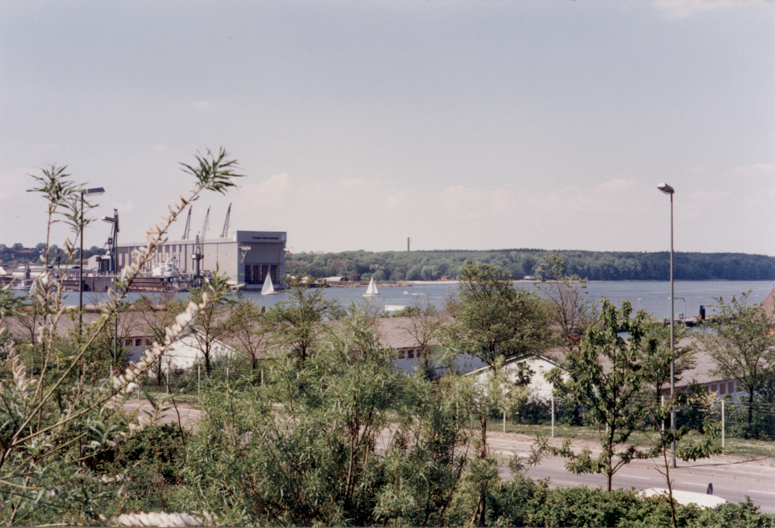 Rand von Kielseng mit Werft im Hintergrund (Flensburg 6 Mai 1990)